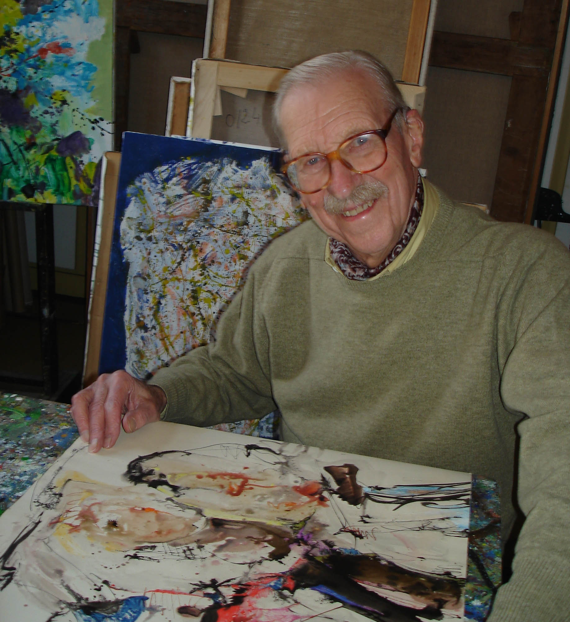 Le peintre Pierre Wemaëre dans son atelier en 2007